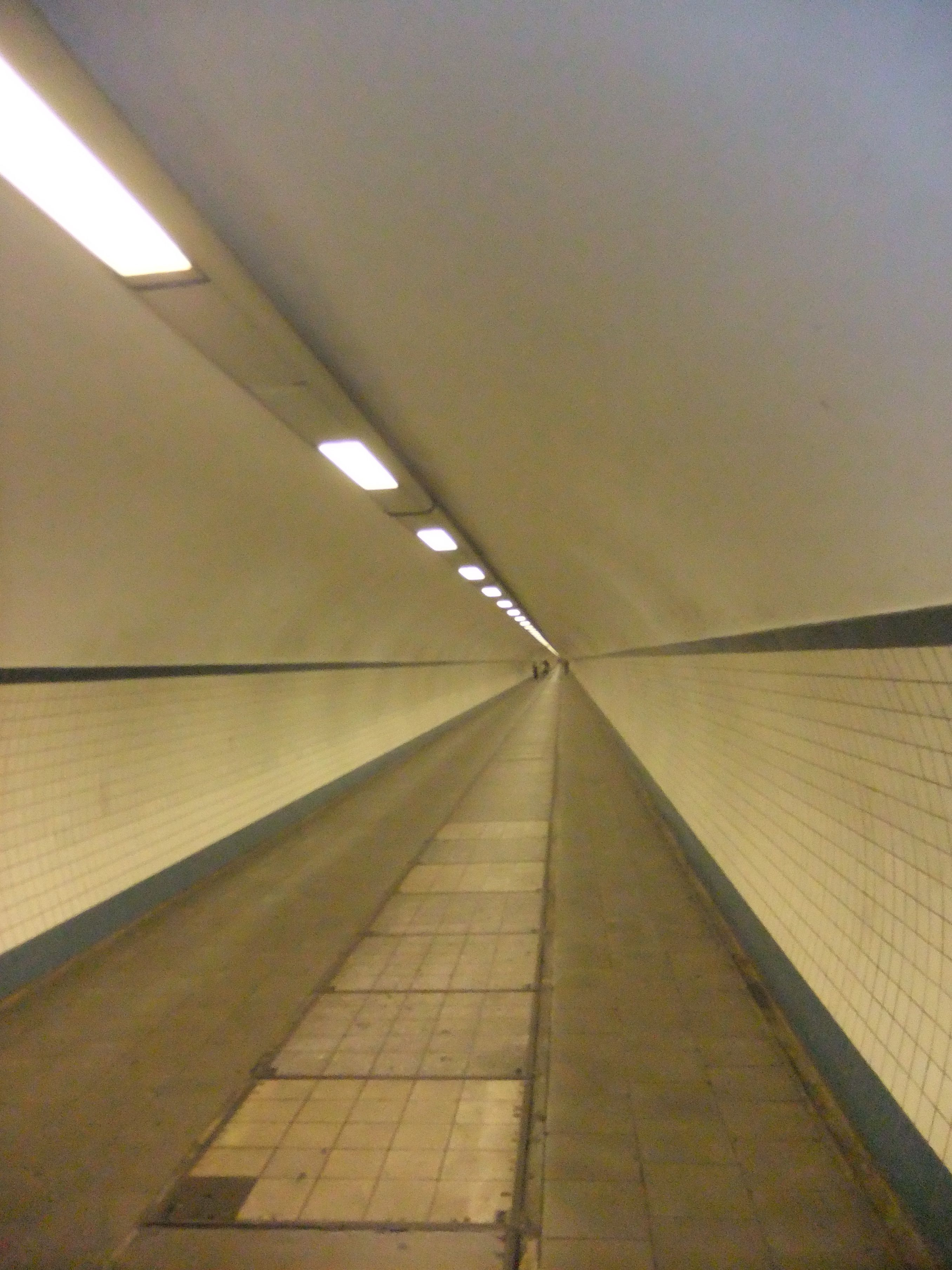 Durchgang des Sint-Anna-Tunnels